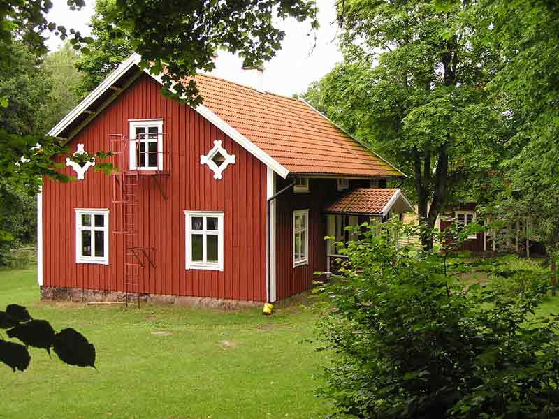 Vandrarhem i Store Mosse nationalpark. "Svänö", byggt 1907.